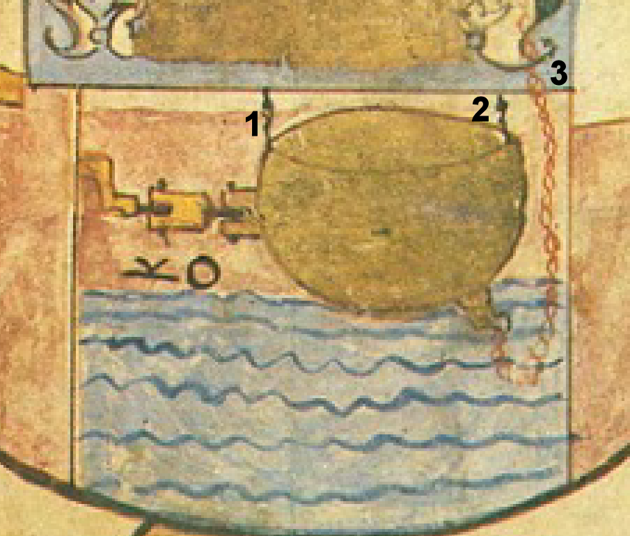 Détail du moteur hydraulique annoté du fichier Commons